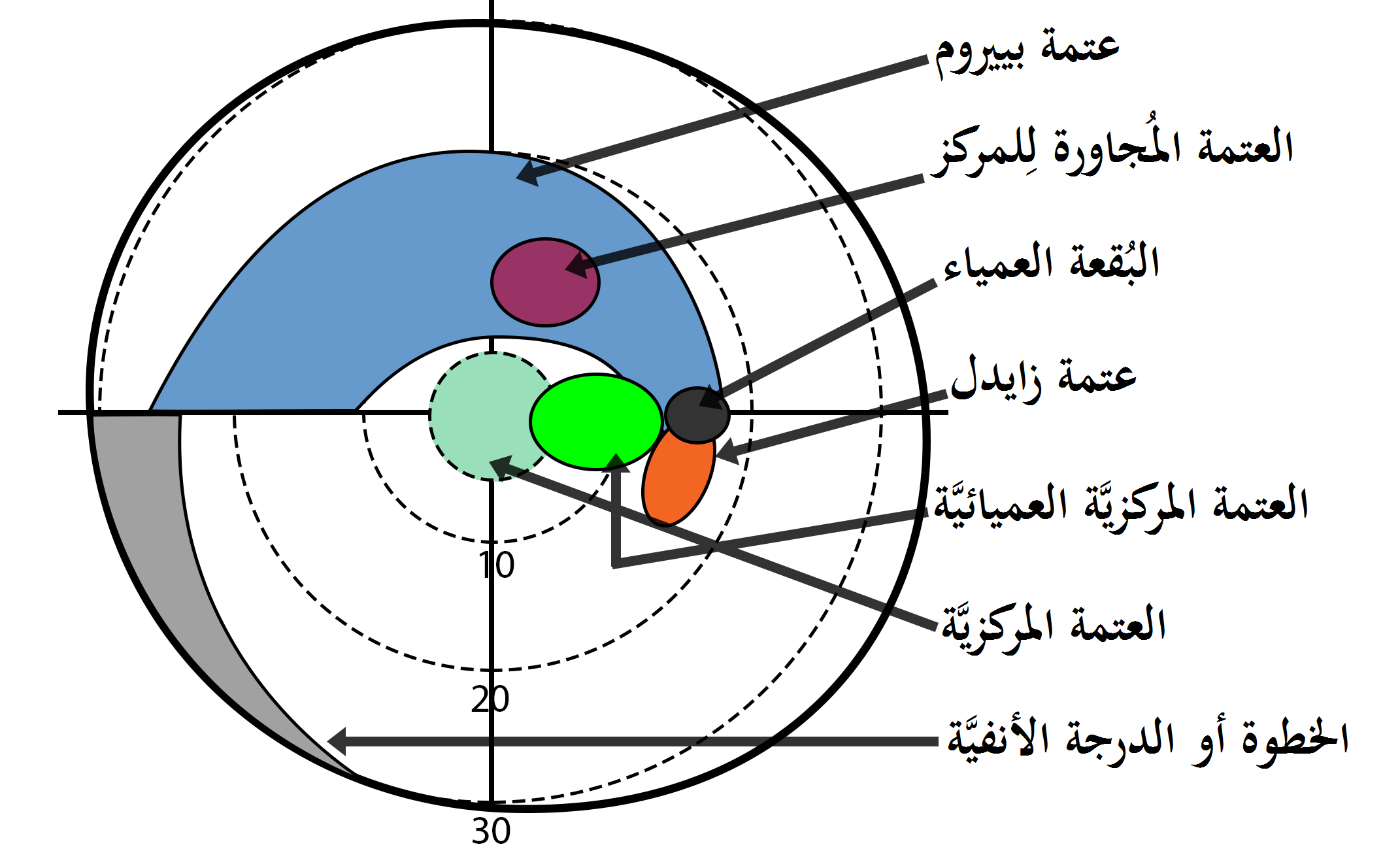 رسمٌ بيانيٌّ يُوضح أنواع العتمة في الشبكيَّة.